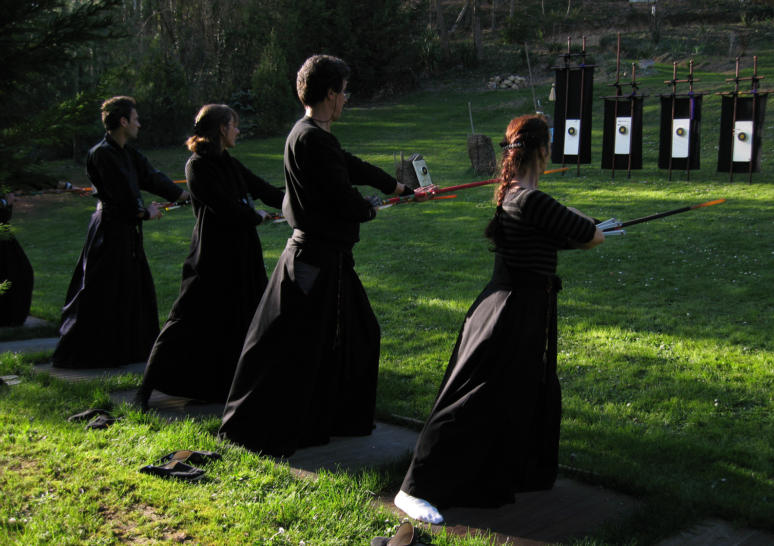 Usage du Hakama dans la pratique du Sarbacana : La fonction de l'hakama offre bien plus qu'un simple effet de surface, il est véritablement un outil de ressenti de l'encrage et des mécanismes de la respiration ventrale. L'intérêt de ce vêtement pour la perception de l'assise et des déplacements du hara ; de la position du bassin, de la relation du ventre et des pieds, etc. Tout cela semble évident pour toute personne qui porte un hakama. Son développé dans l'espace est tout aussi intéressant., lors des chutes en Aïkido, par exemple, notre vision périphérique perçoit l'hakama qui se déploie comme un éventail, comme une aile. Cela donne un vécu, une compréhension de "l'envol" de la chute. Ce qui pourrait apparaître comme un simple détail poétique-scénique peut devenir une réelle source de prises de conscience.